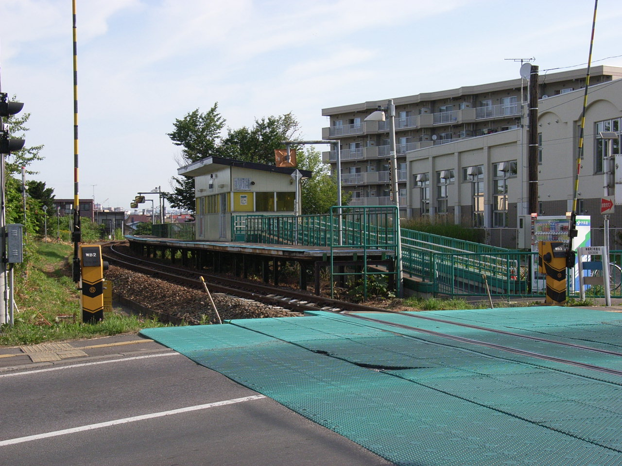 2005年の改修工事後の神楽岡駅